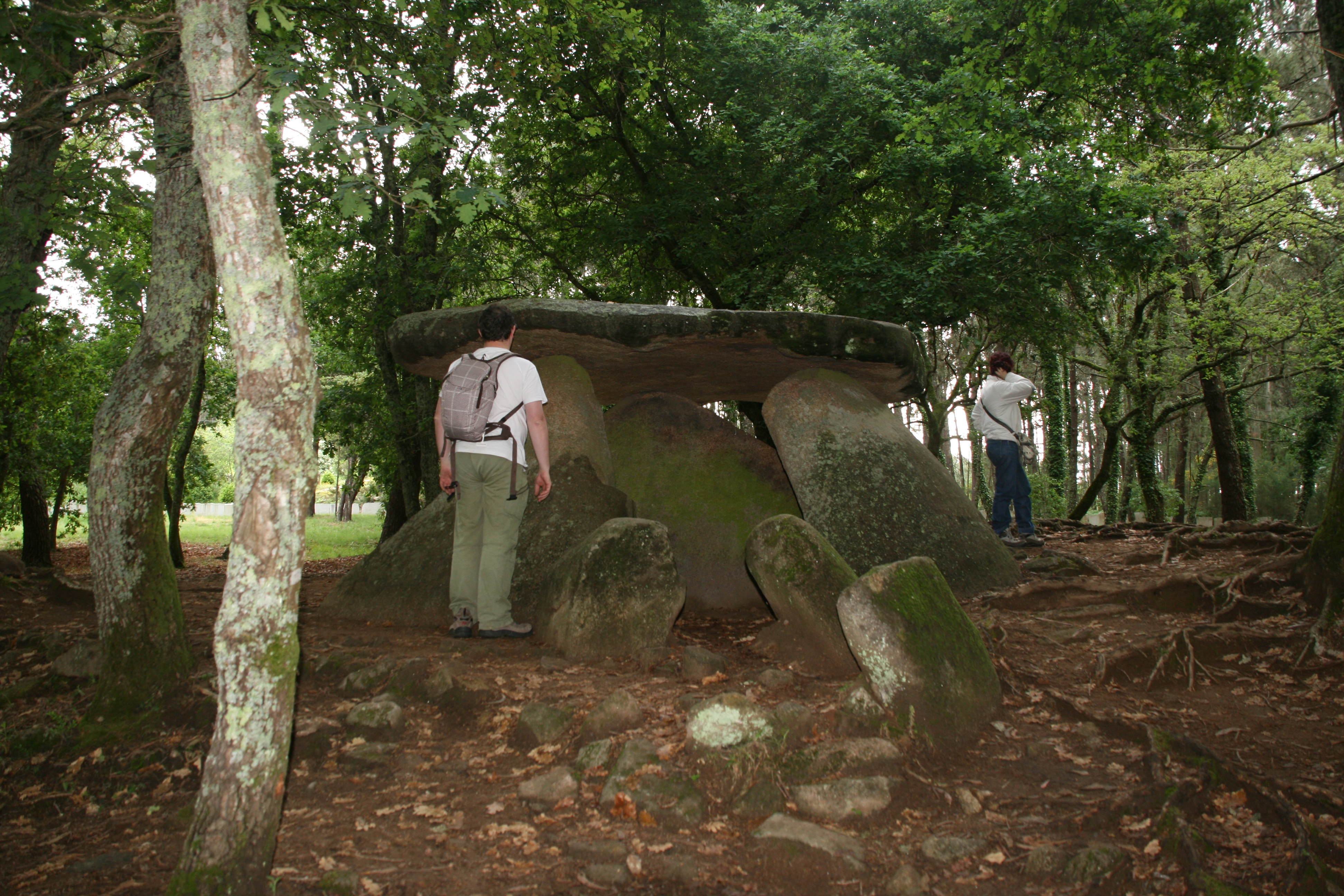 Dolmen de Axeito. El individuo referencia mide 1,81 metros.